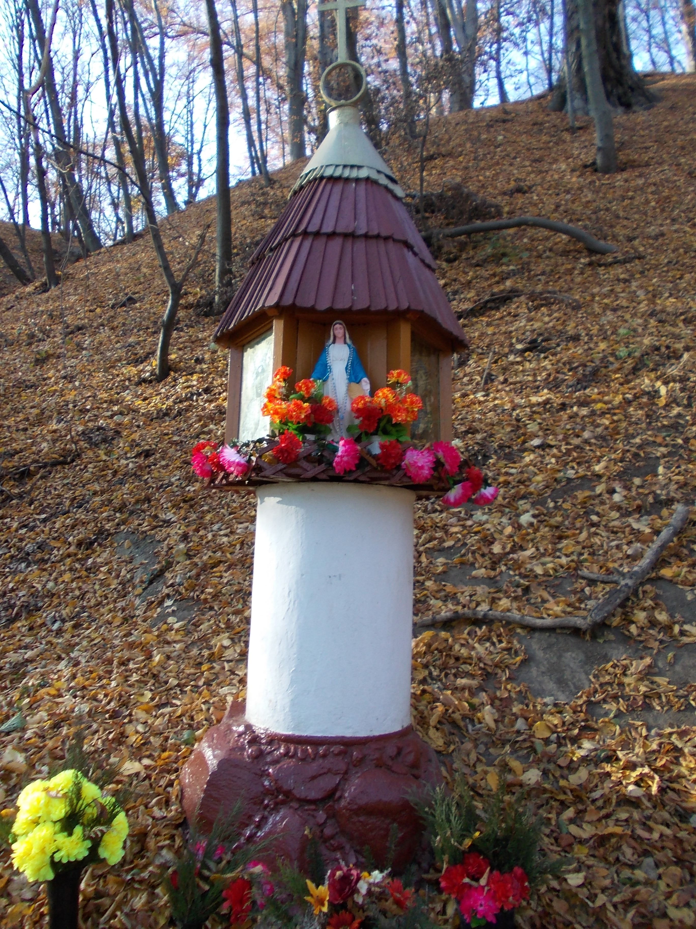 Grzegorzowice- kapliczka w buczu